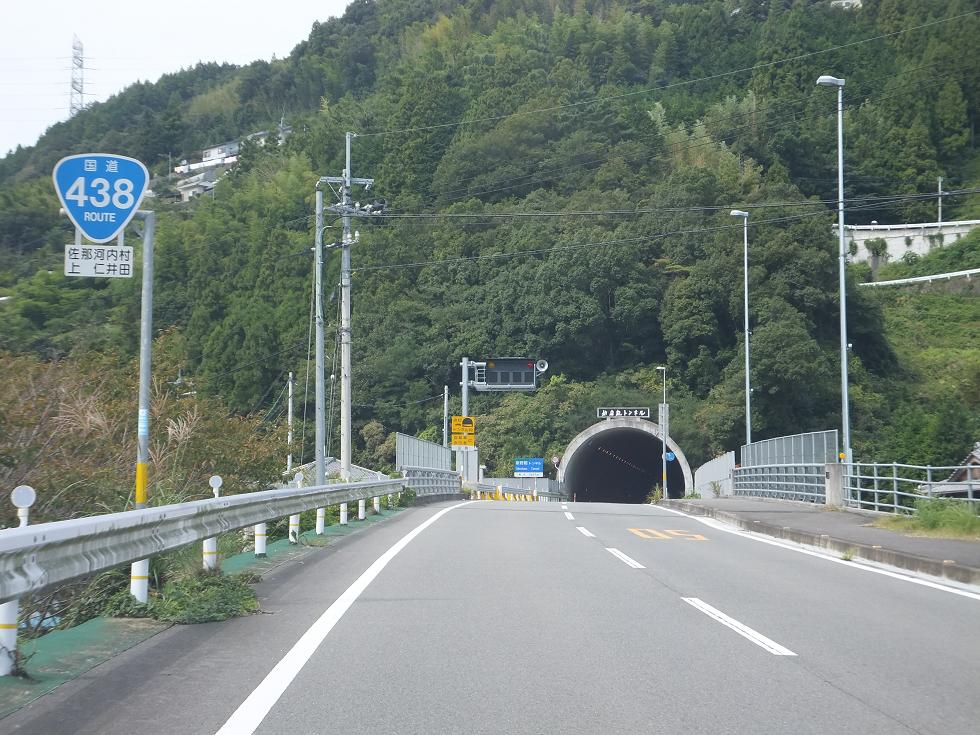 国道438号府能バイパス（徳島県名東郡佐那河内村）